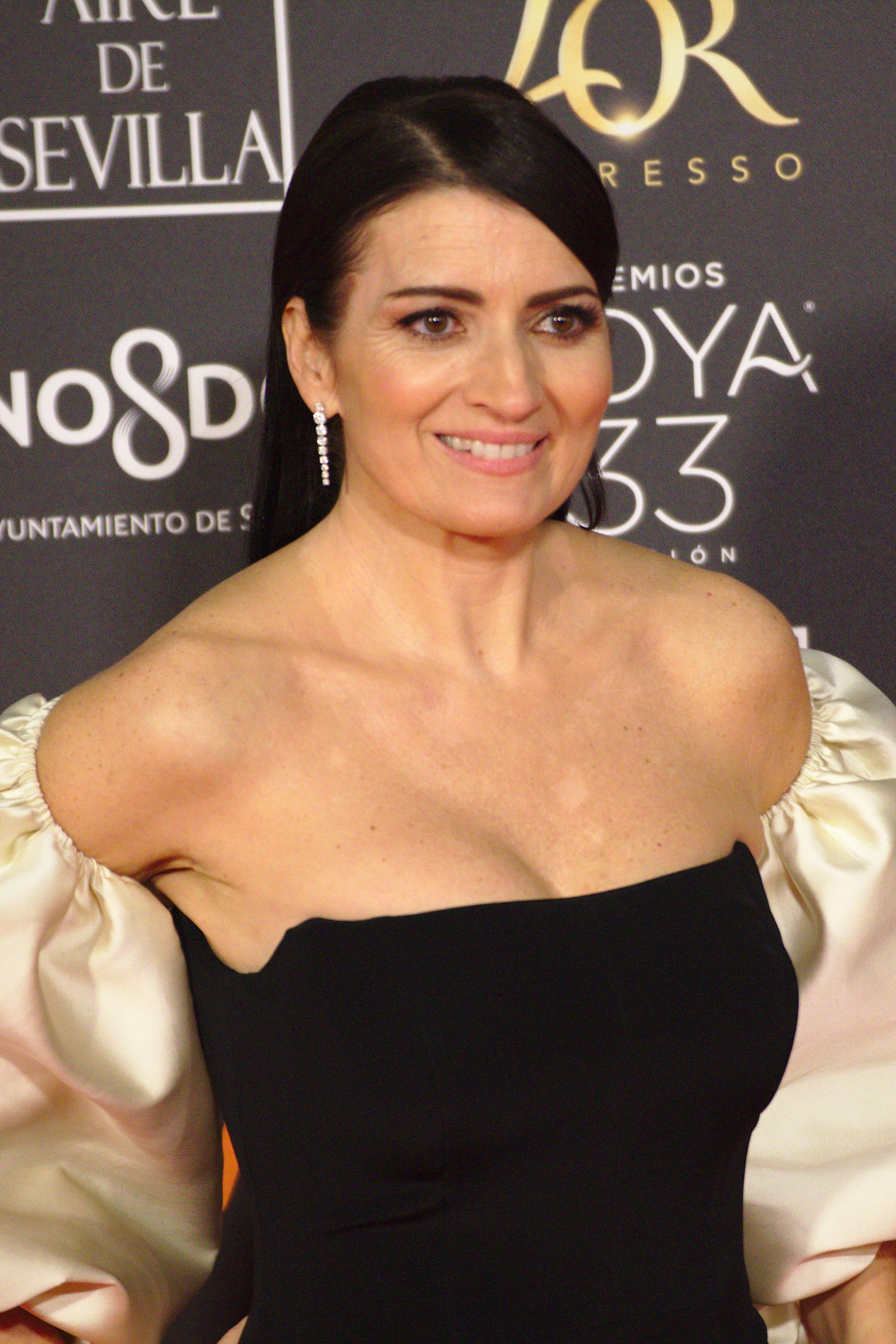 Silvia Abril en la alfombra roja de los Premios Goya celebrados en Sevilla en Febrero 2019